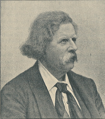 Leopold Budde